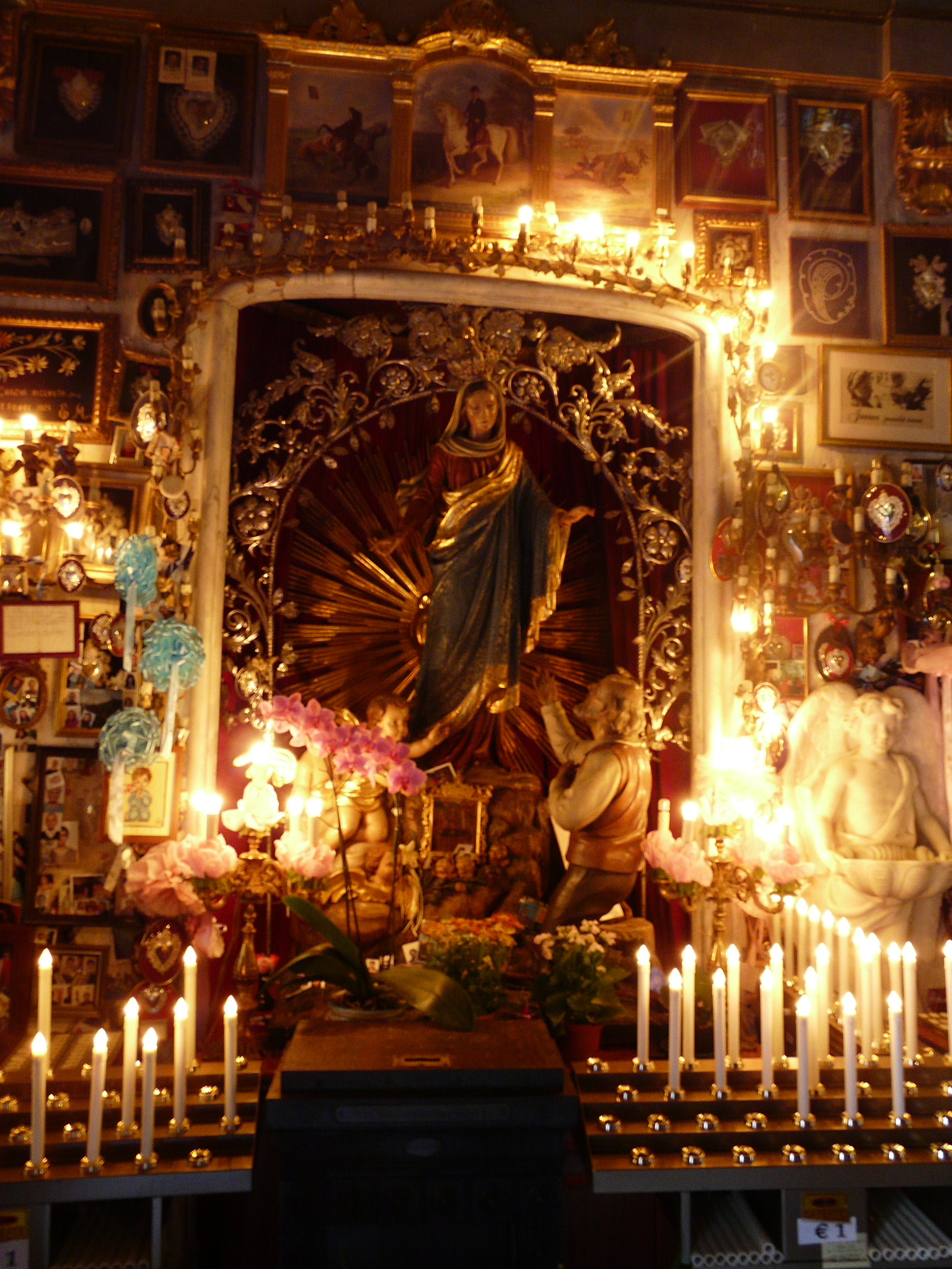 Statua dell'Apparizione mariana, Santuario di Nostra Signora di Montallegro, Rapallo, Liguria, Italia